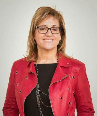 María Antonia García Benau. Universitat de València